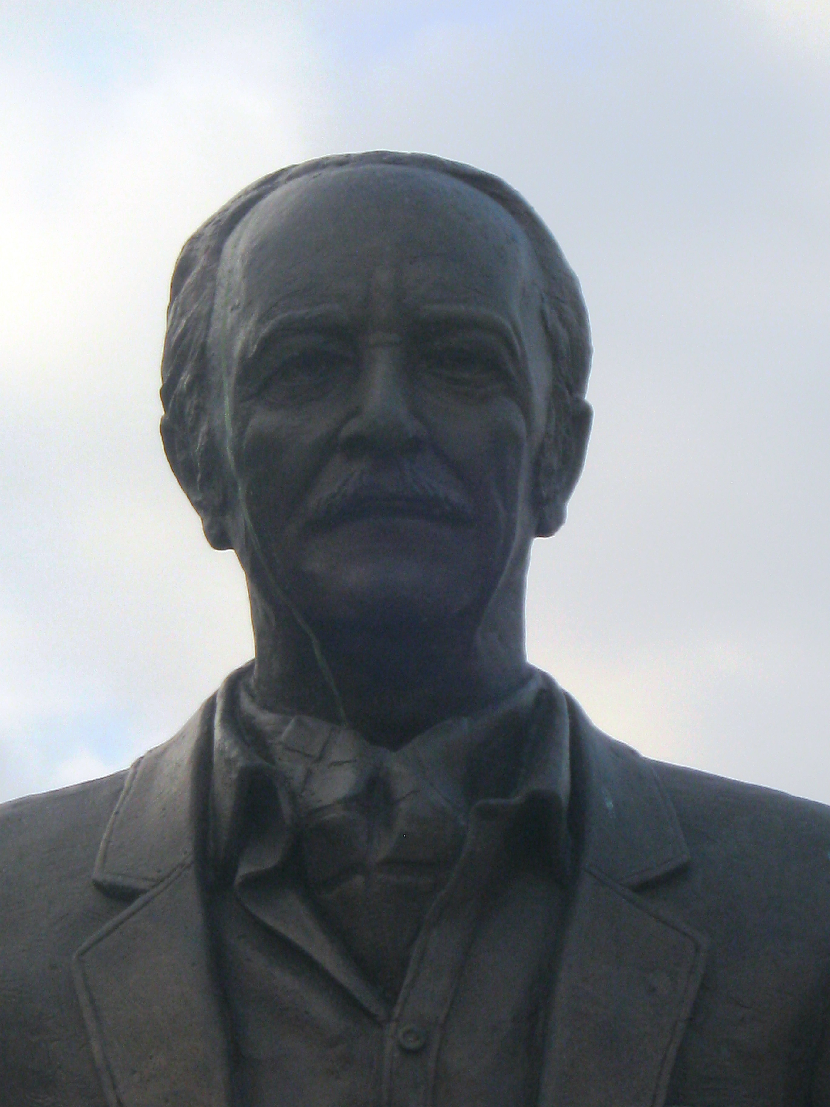 Споменик на Славко Јаневски на Мостот на уметноста во Скопје